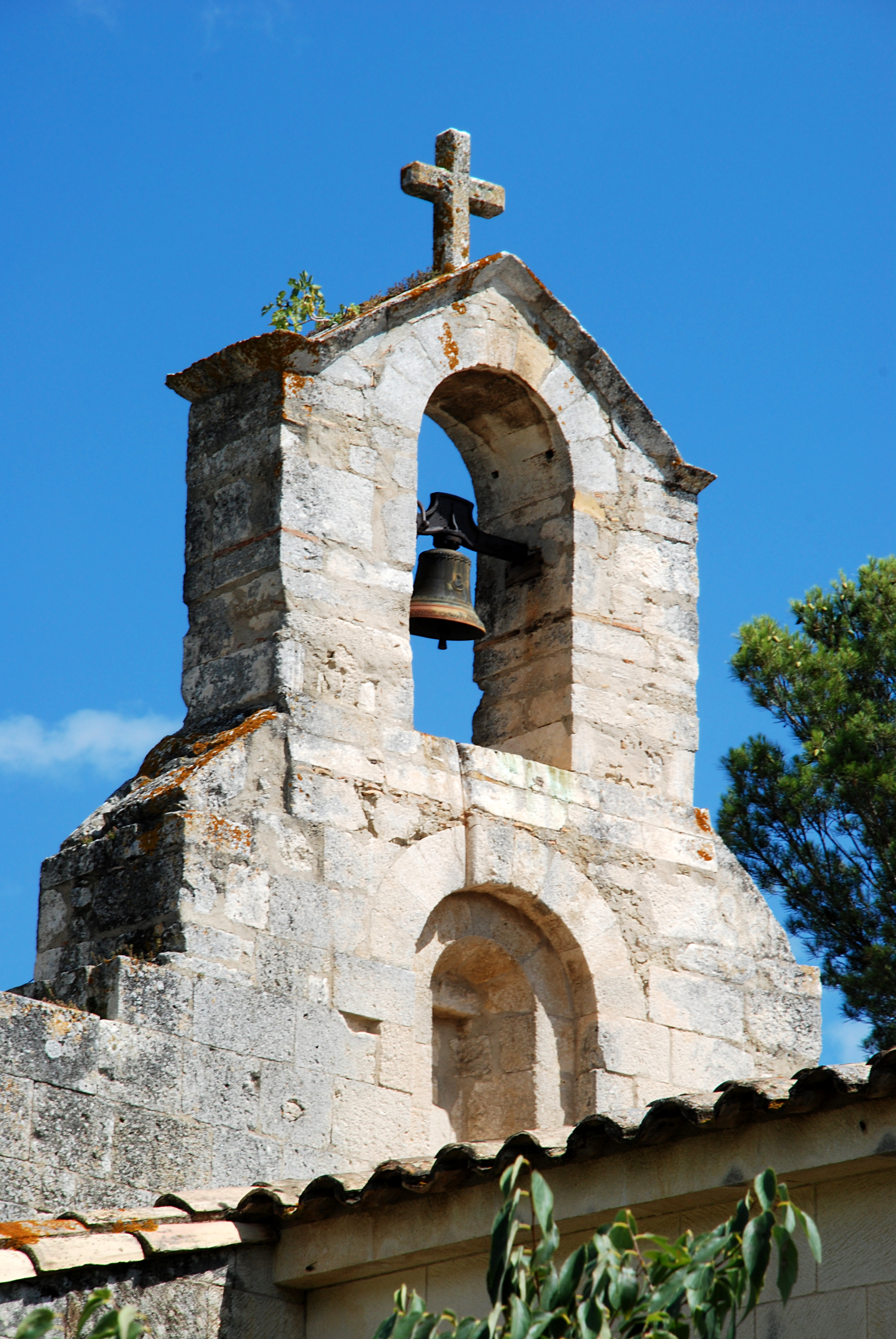 France - Gard - Chapelle Saint-Amand de Théziers